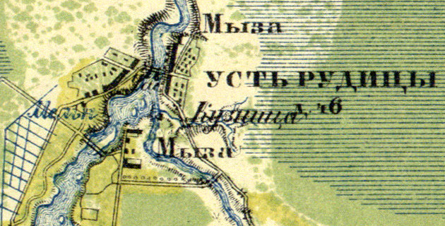 Деревня Усть-Рудицы на карте 1860 года.